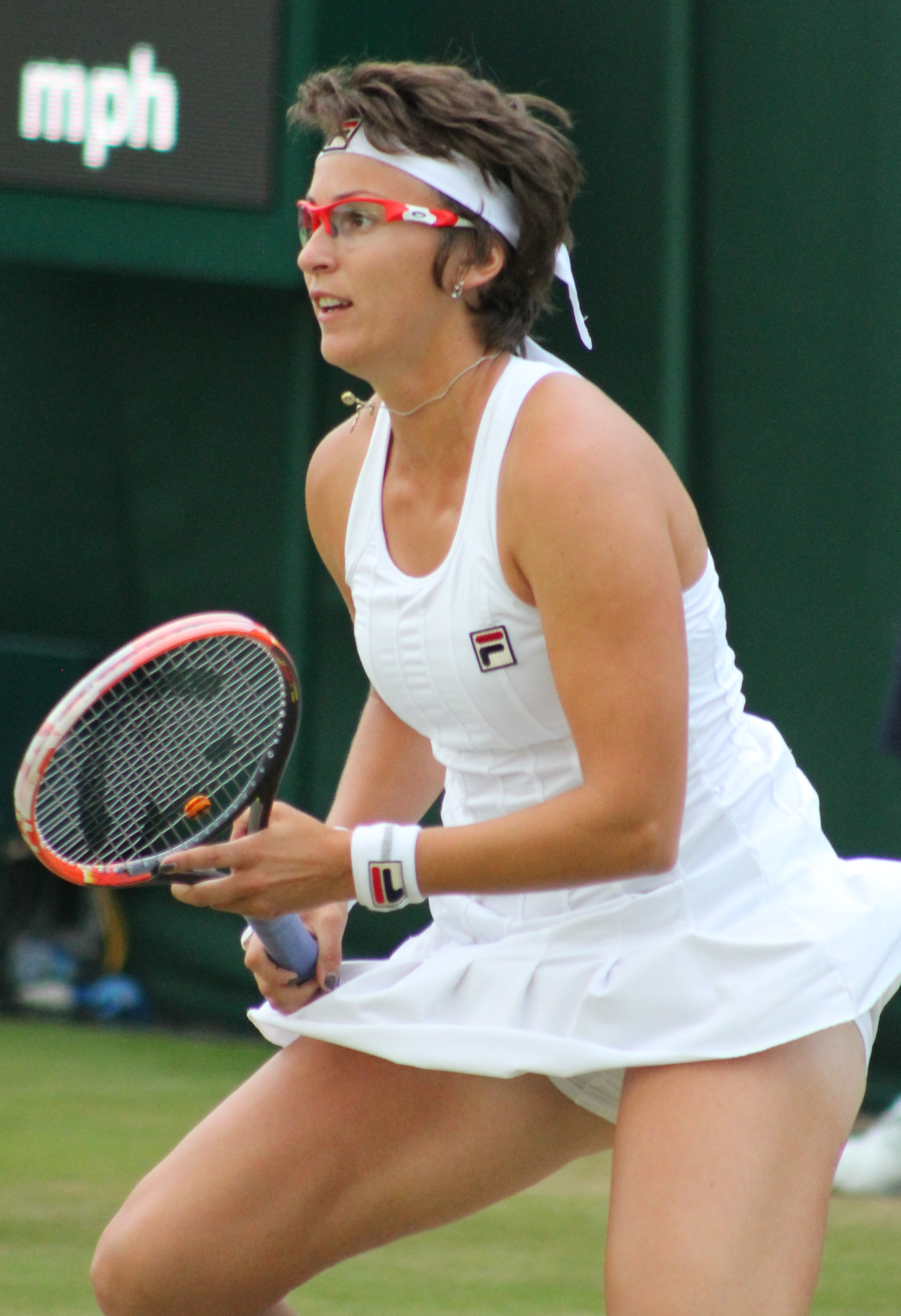 Shvedova WM14 (8)